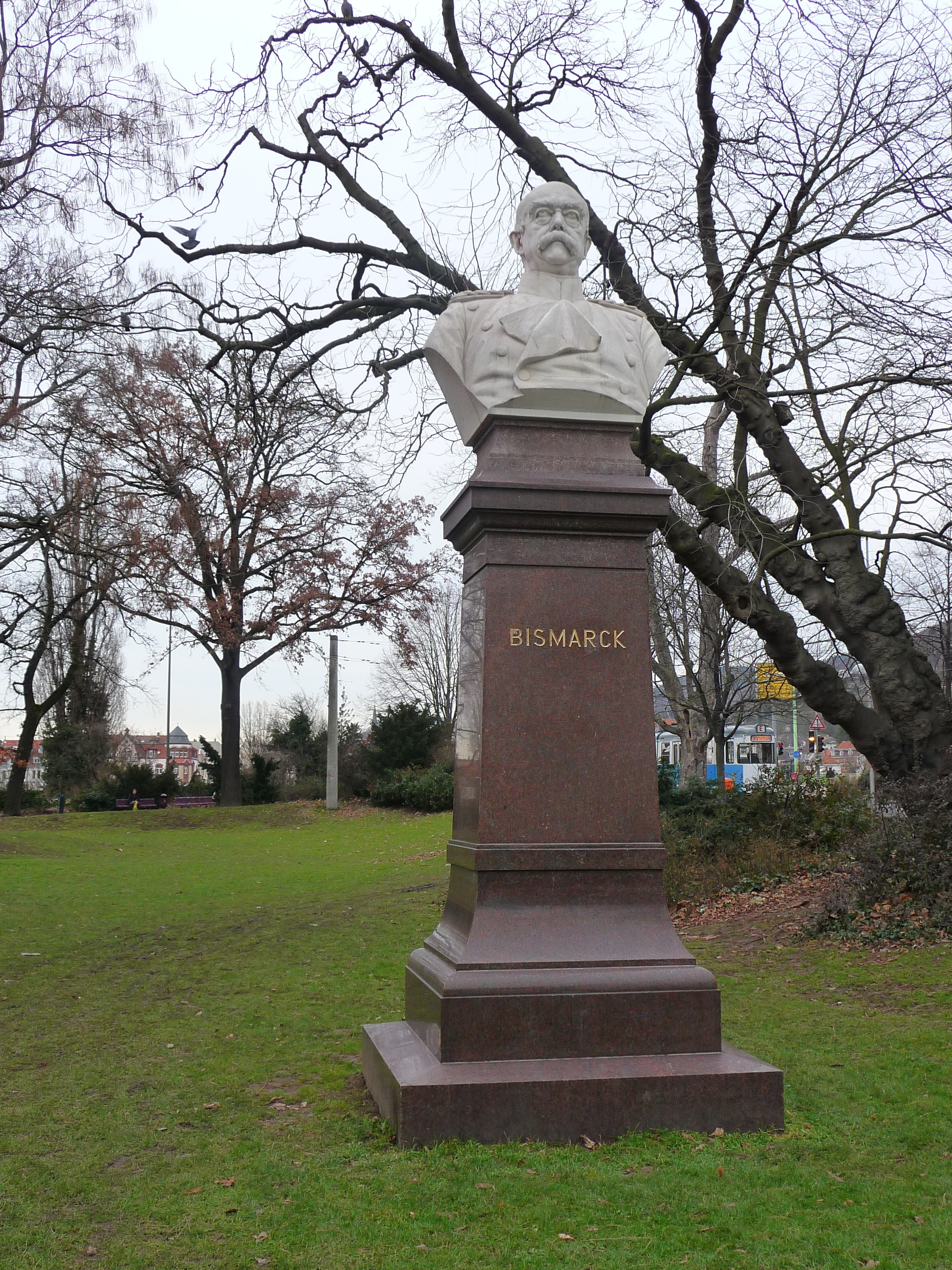 Büste von Bismarck an der Nordseite des gleichnamigen Platzes in Heidelberg